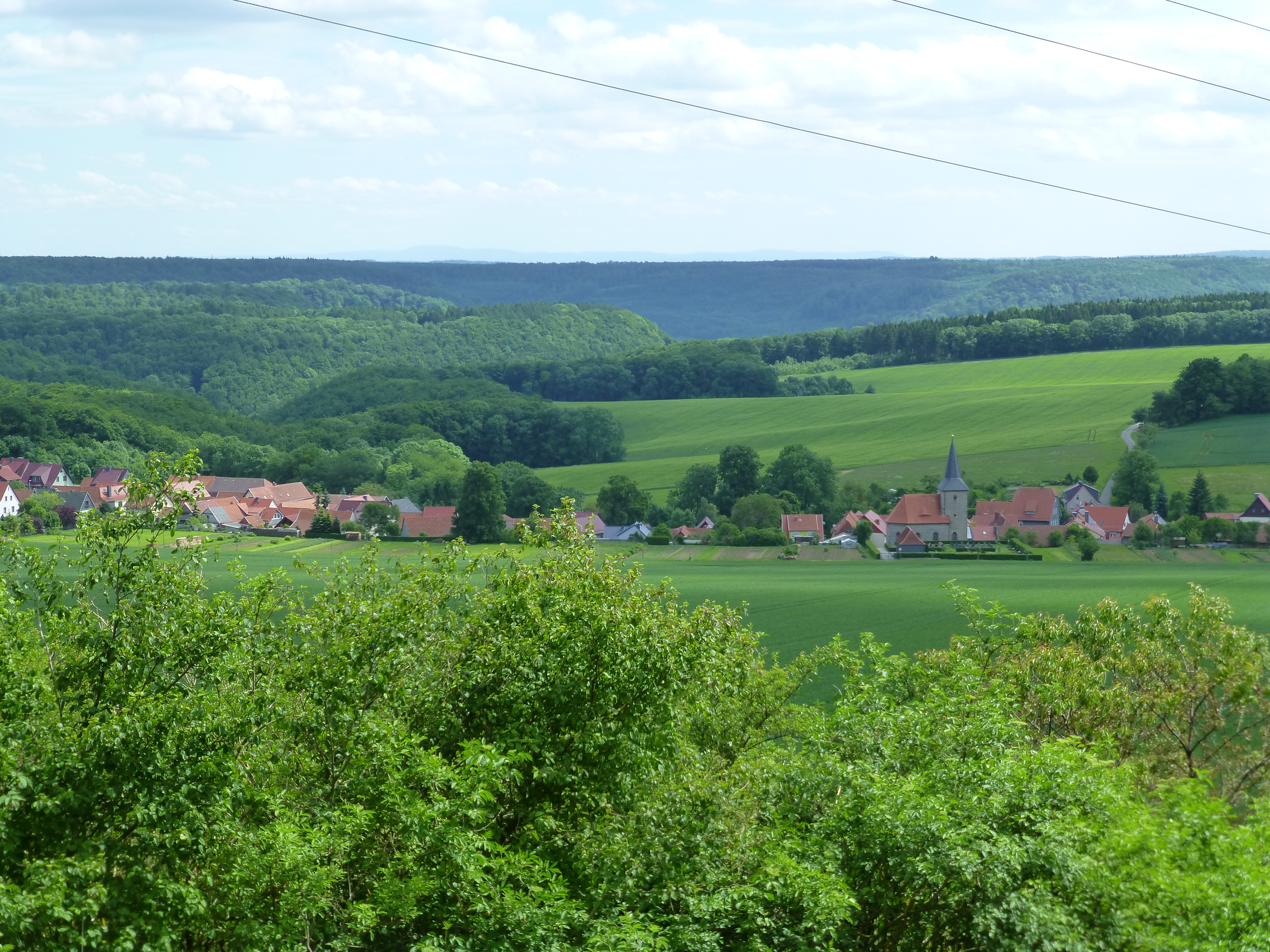 Blick auf Flinsberg vom Warteberg aus (im Hintergrund ist der westl. Thüringer Wald mit dem Inselsberg erkennbar)